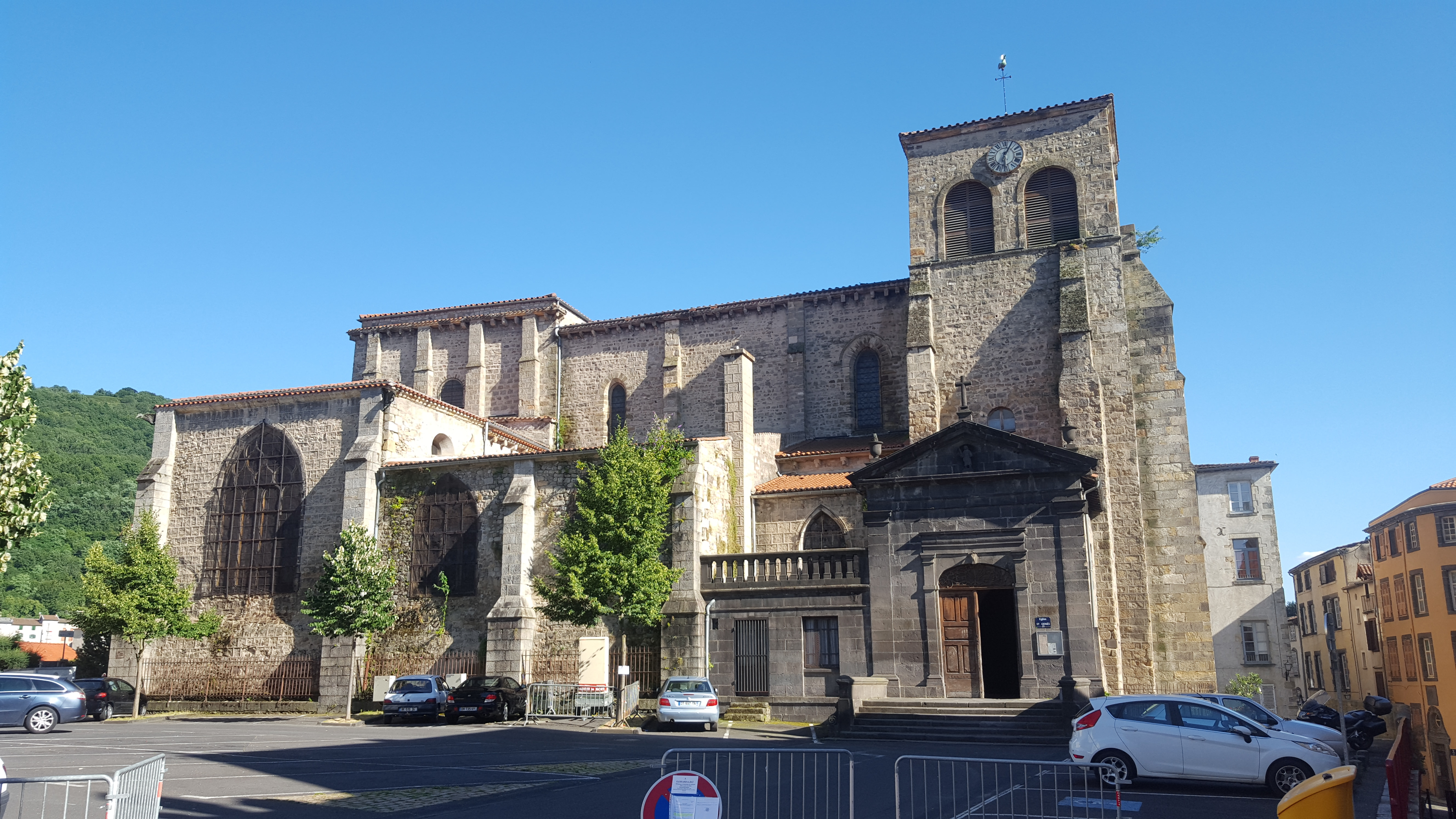 L'église Saint-Genès de Thiers en Auvergne.